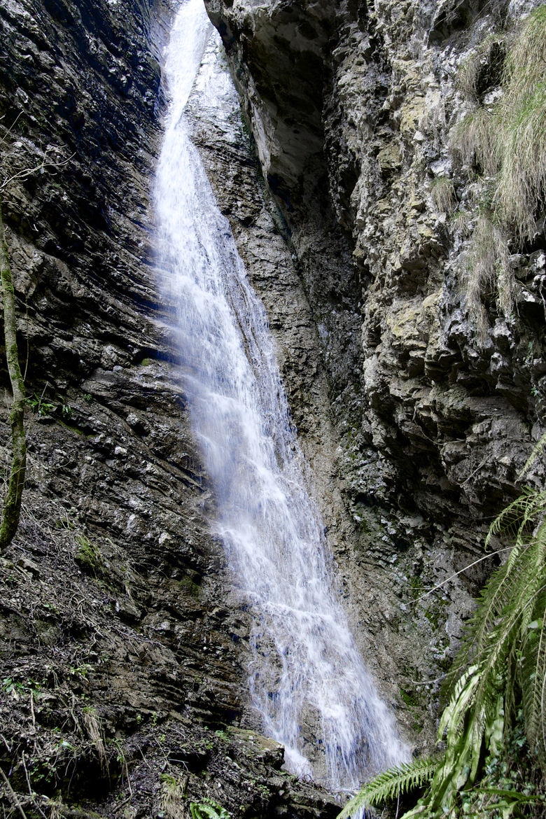 Cascata torrente Bova, Orrido di Caino, Erba (CO).